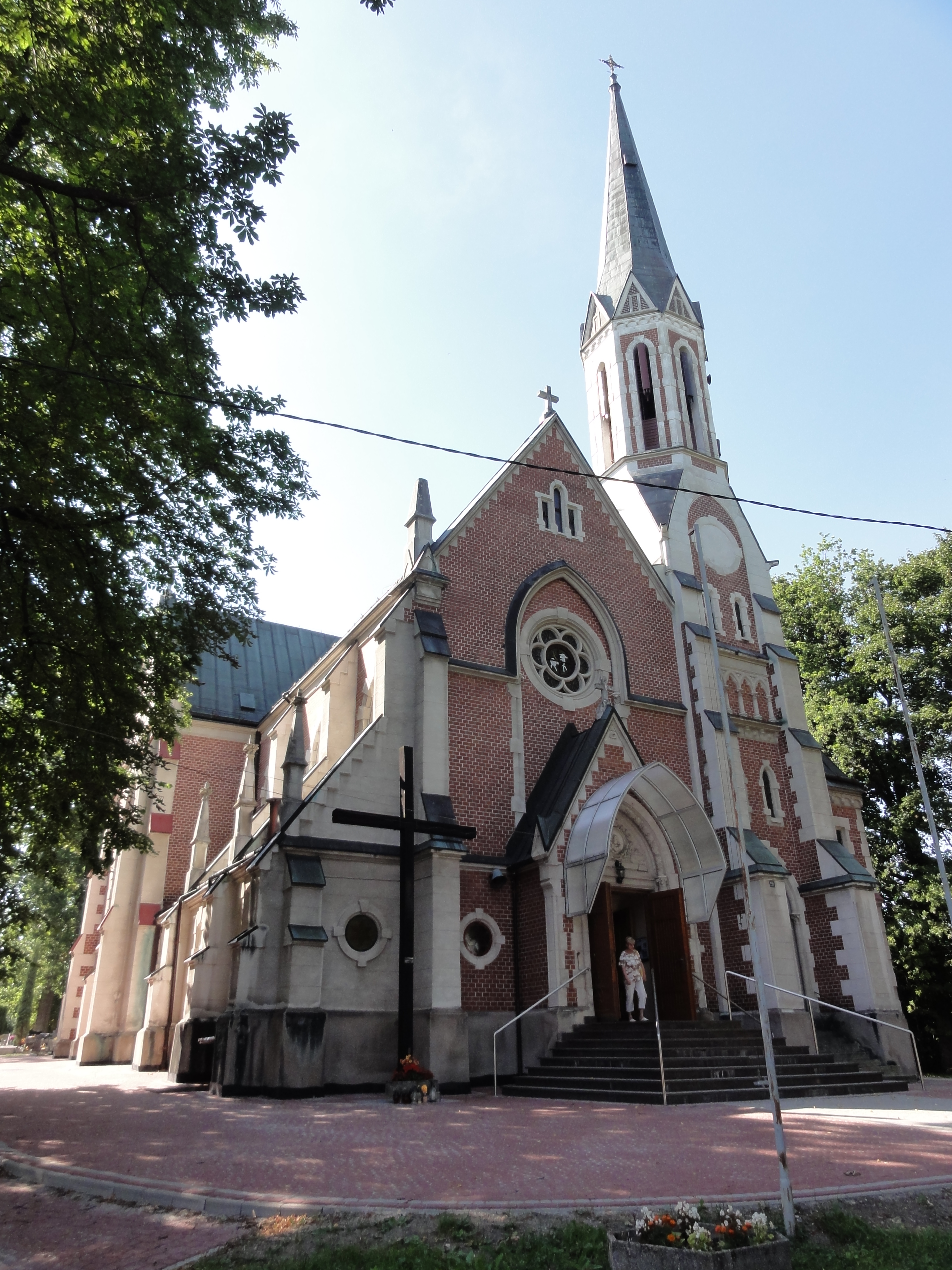 Kościół św. Małgorzaty w Bielsku-Białej (Kamienicy)